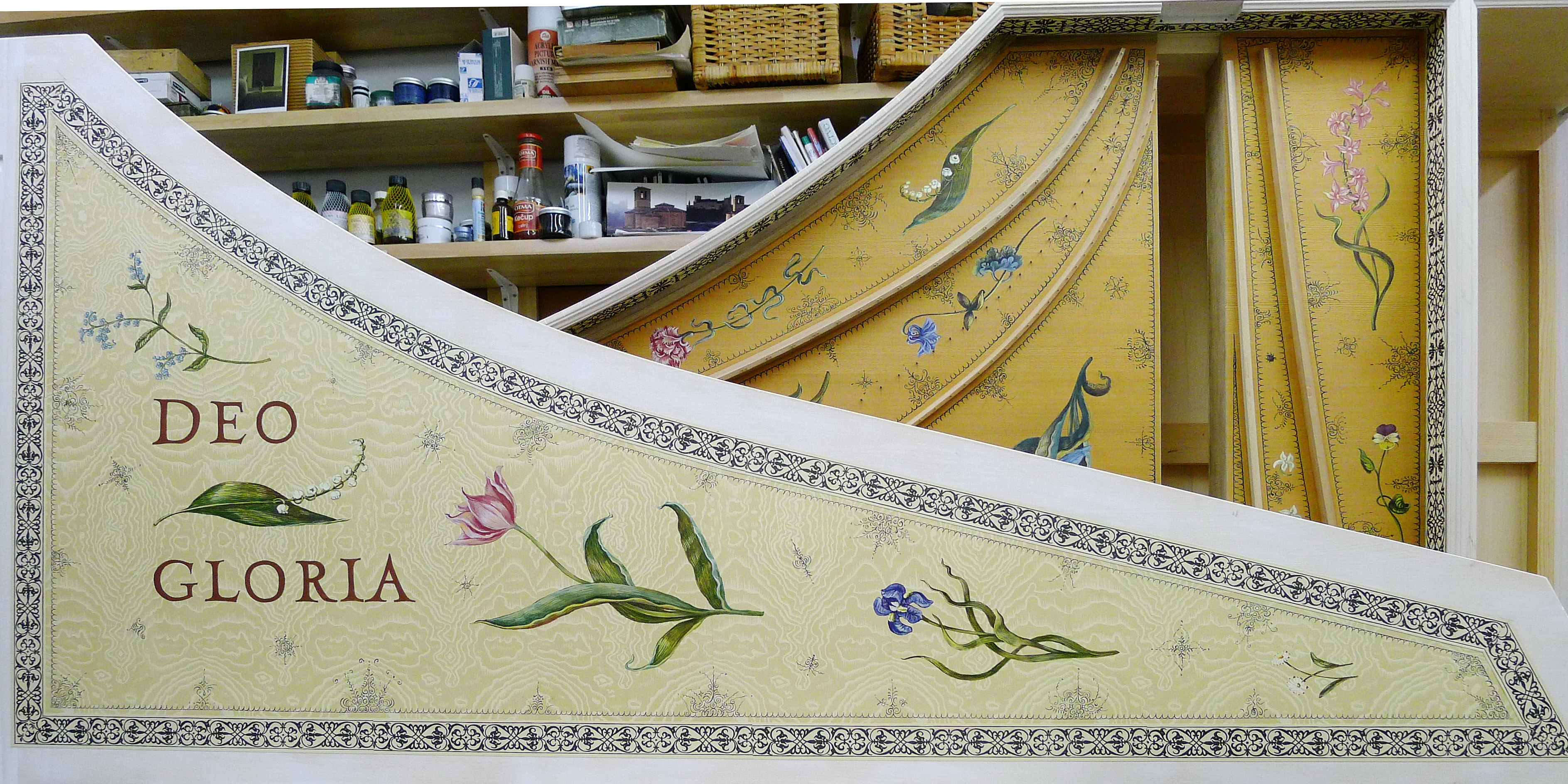 Dílo Miluše Poupětové Dekory na čembalech jsou volné, avšak dobově pojaté kopie. Tento typ je vlámský, tvořivě jsou pojaté i ornamenty, které se nikdy neopakují, ač drží slohovou jednotu, jsou vždy originální a neexistují dva stejné. jsou psány kaligrafickým způsobem, štětcem nejvyšší kvality - kuní vlas Kolinsky, velikost 0 až 3/0. Také mám ráda papoušky, kteří se do Holandska dováželi a zobrazovali je a tamní tulipány, které mi dováží bratr z Holandska. Nástroj je kopie podle rodiny Ruckersů, 1623 - Andreas Ruckers, a pozdější, 1646, 1651, zkrátka polovina 17. stol.